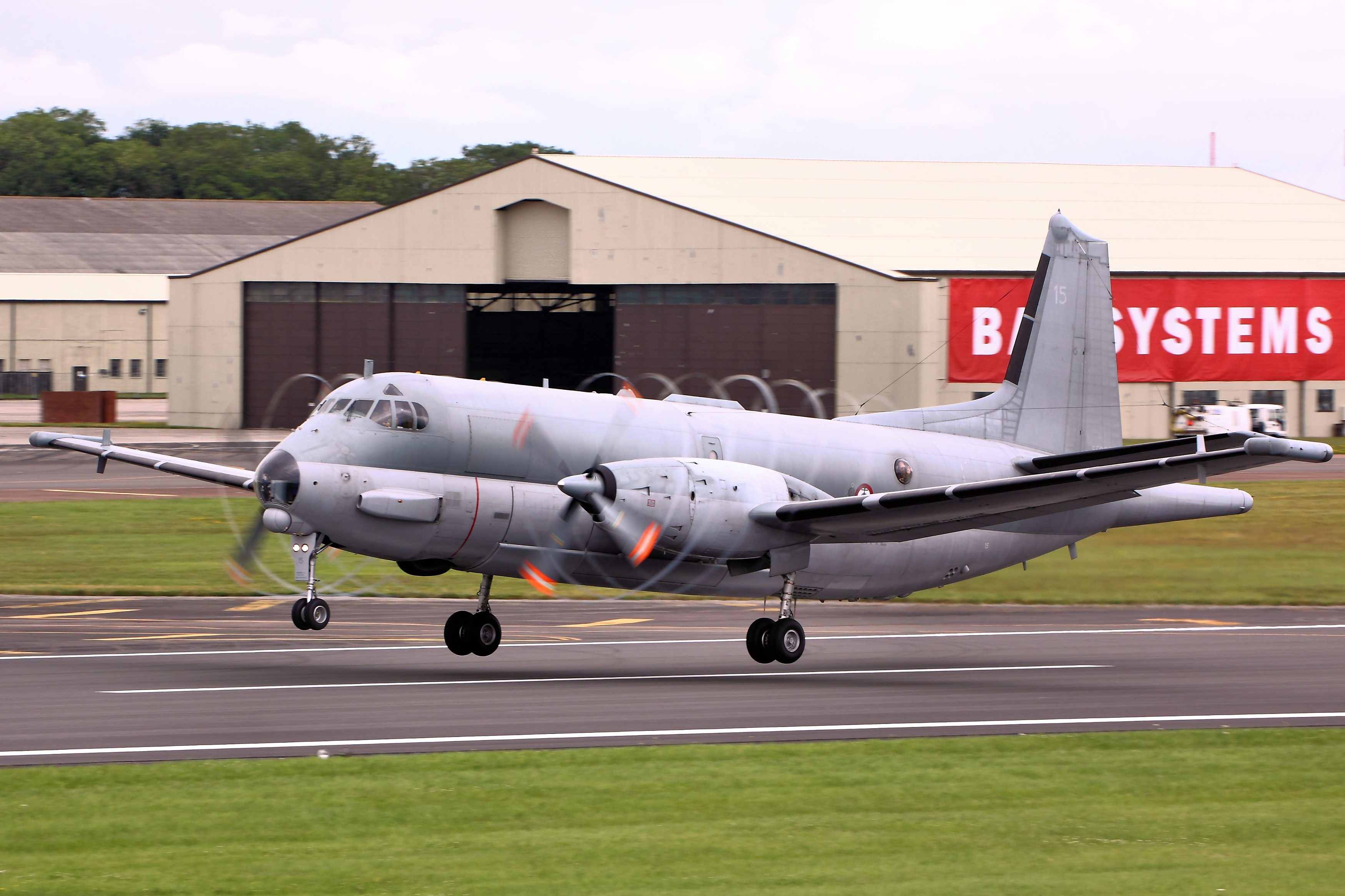 Breguet Atlantique - RIAT 2012